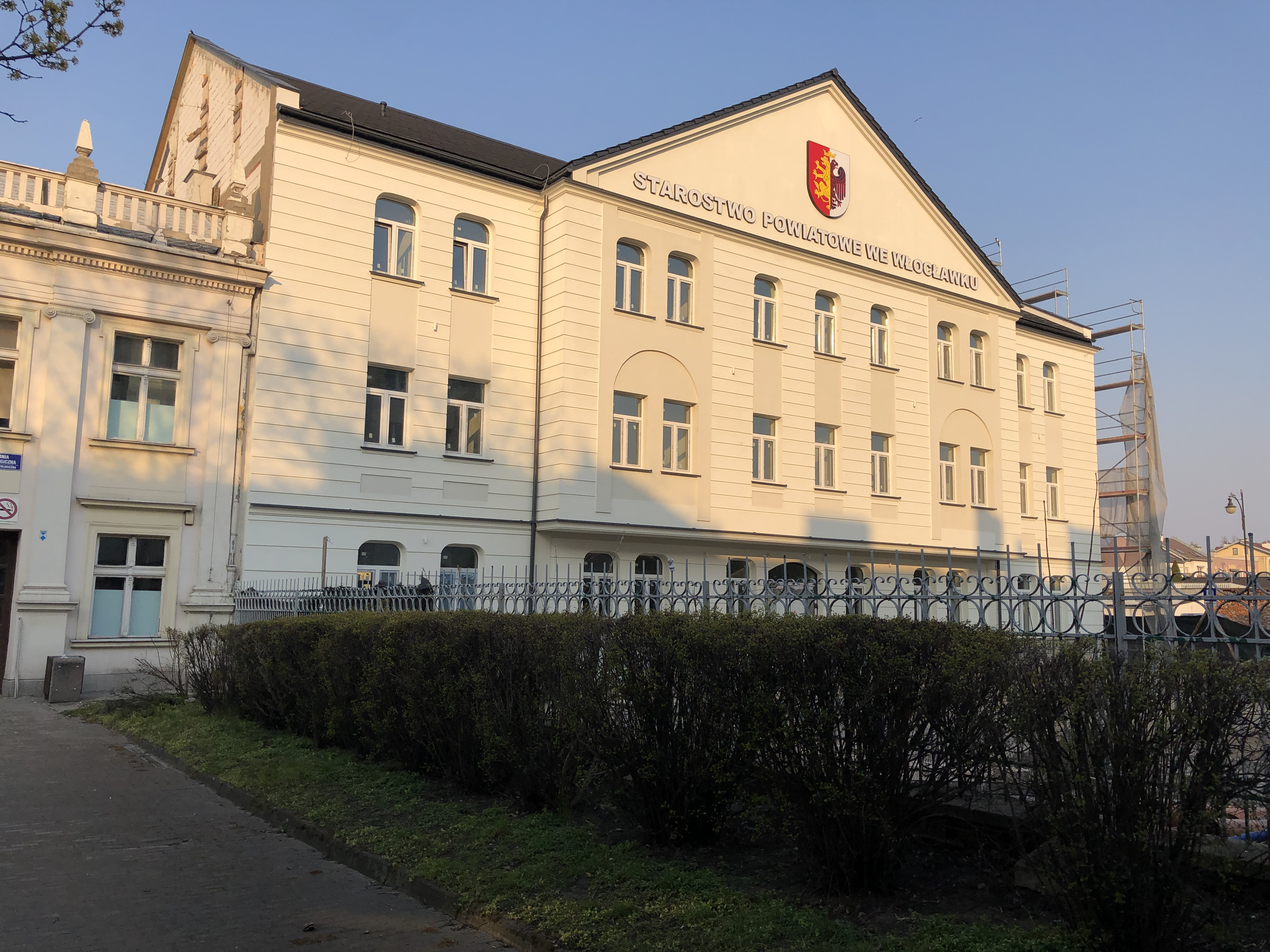 Nowy budynek Starostwa Powiatowego (2020 r.).